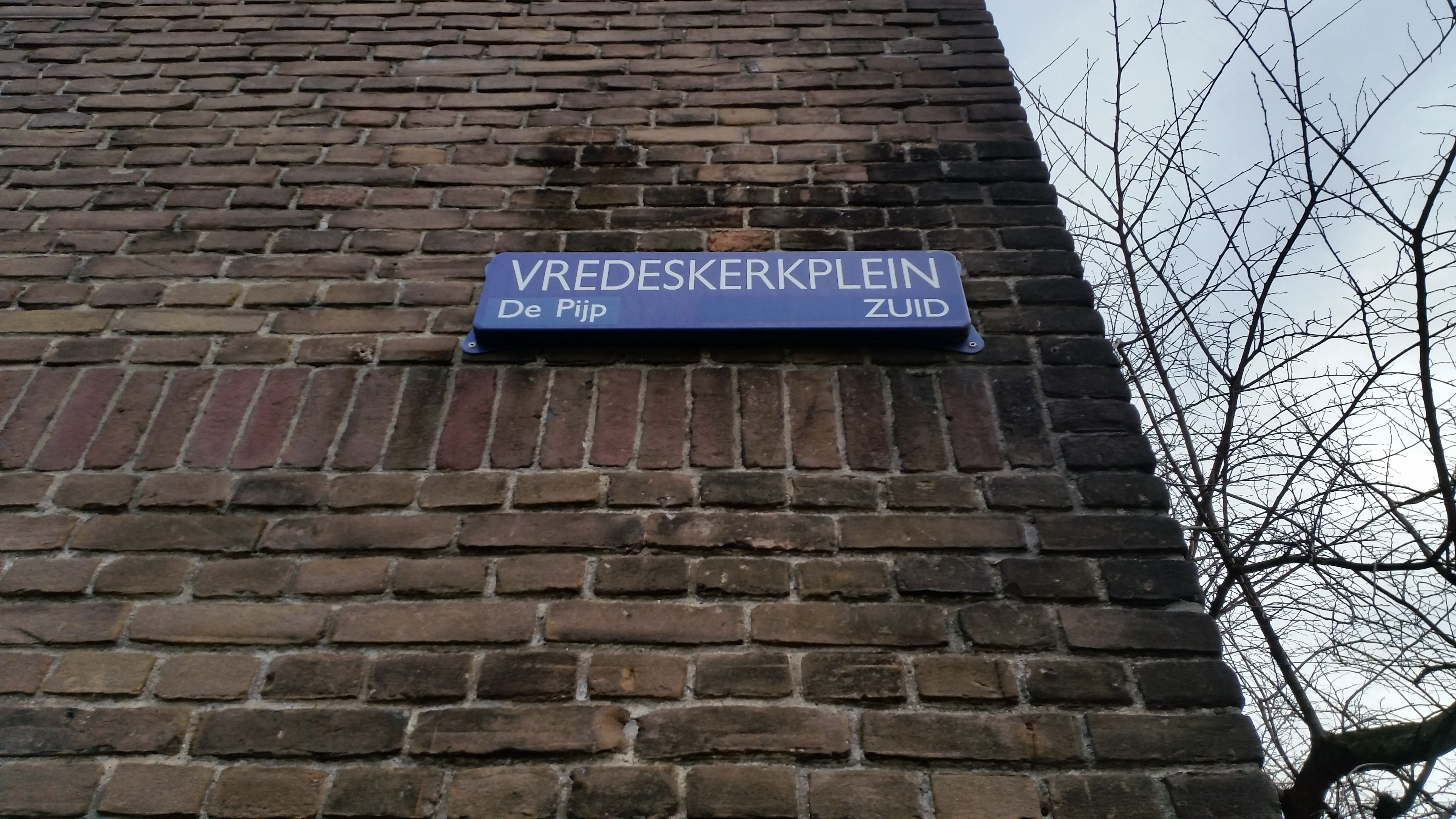 Naambord, Vredeskerkplein